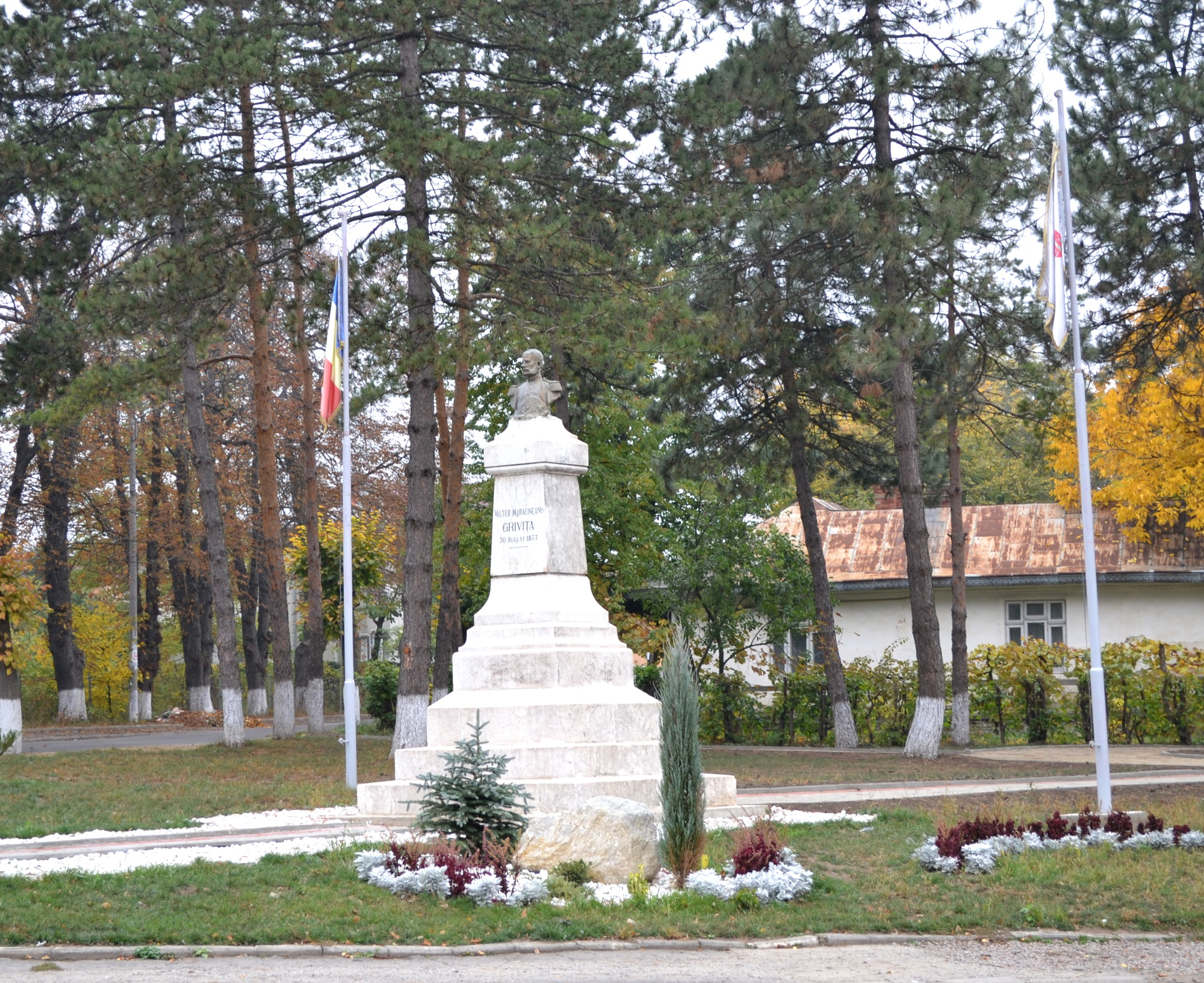 Bustul lui Valter Mărăcineanu